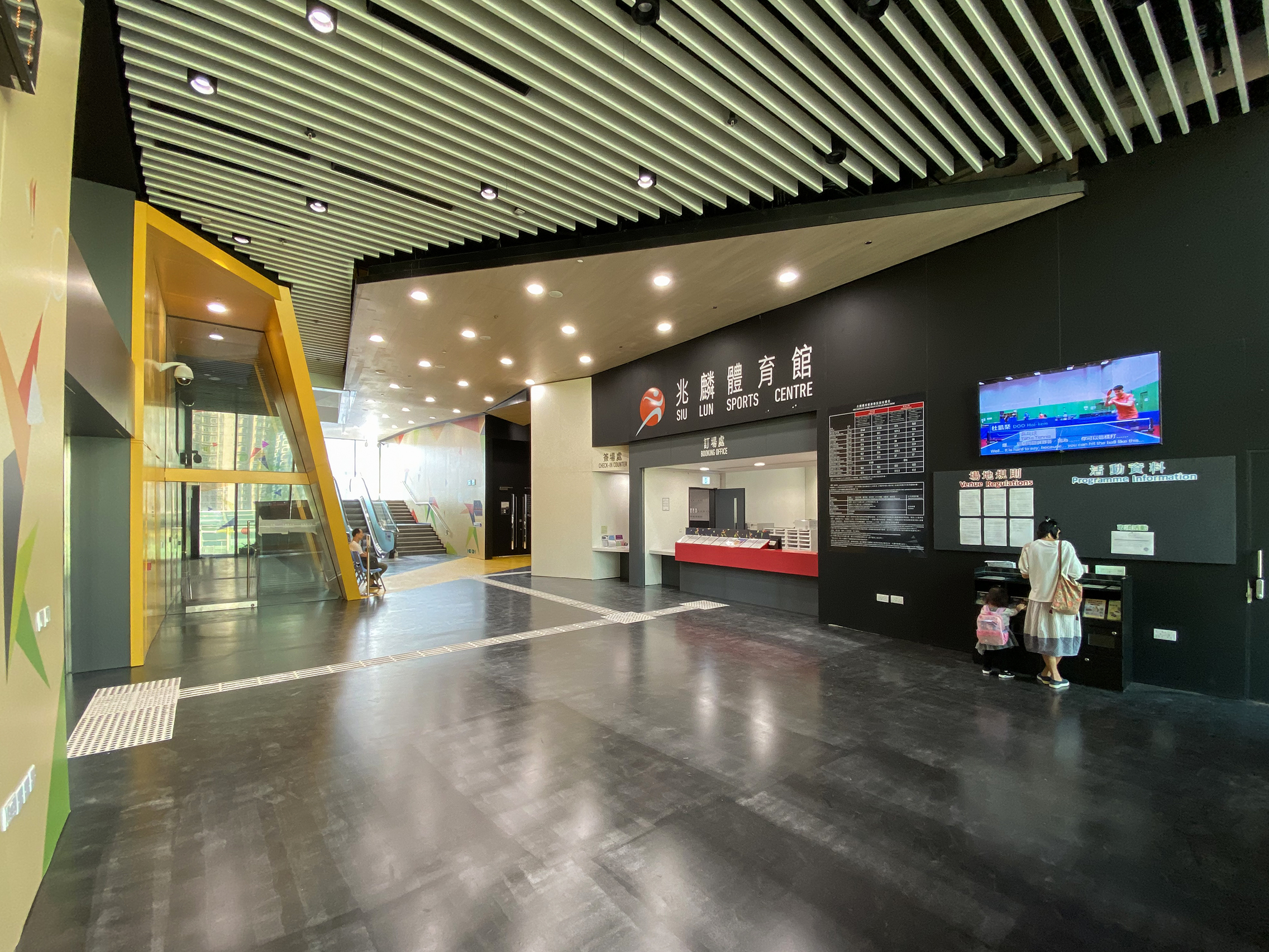 Siu Lun Sports Centre Level 3 lobby